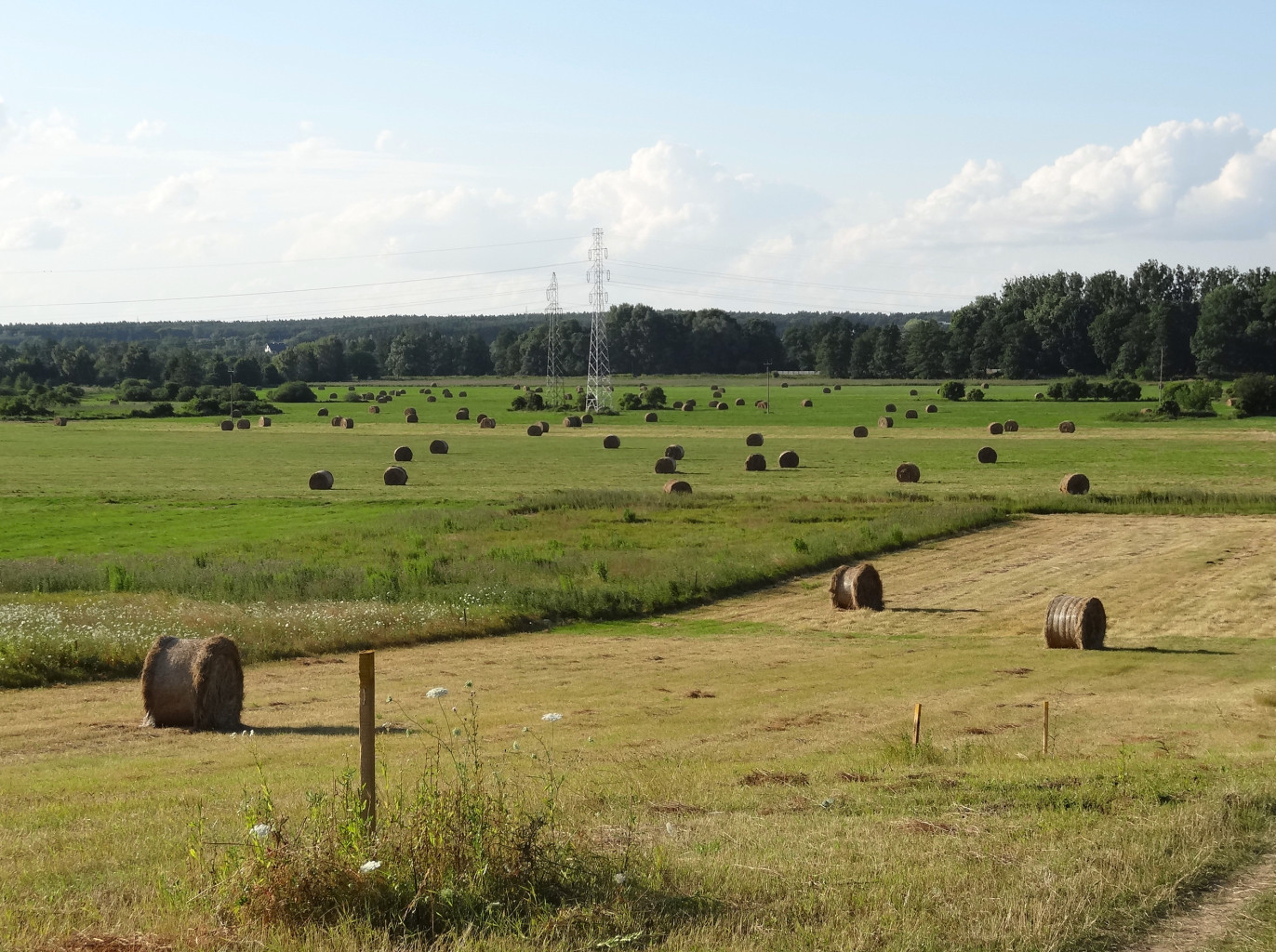 Tereny użytkowane jako pola uprawne i łąki na osiedlu Prądy w Bydgoszczy